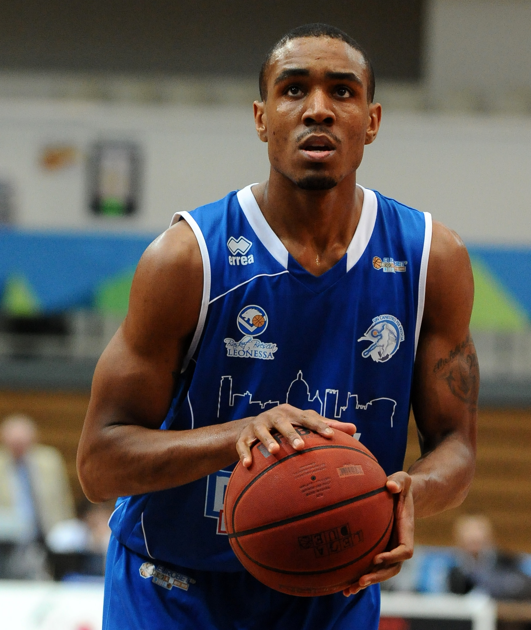 Michael Jenkins al PalaTrento durante una partita contro l'Aquila Basket Trento.